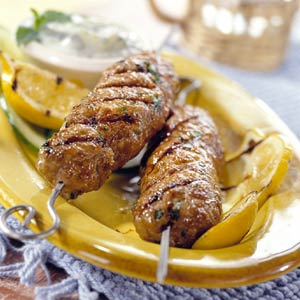 الكفتة بالطحينة العراقية